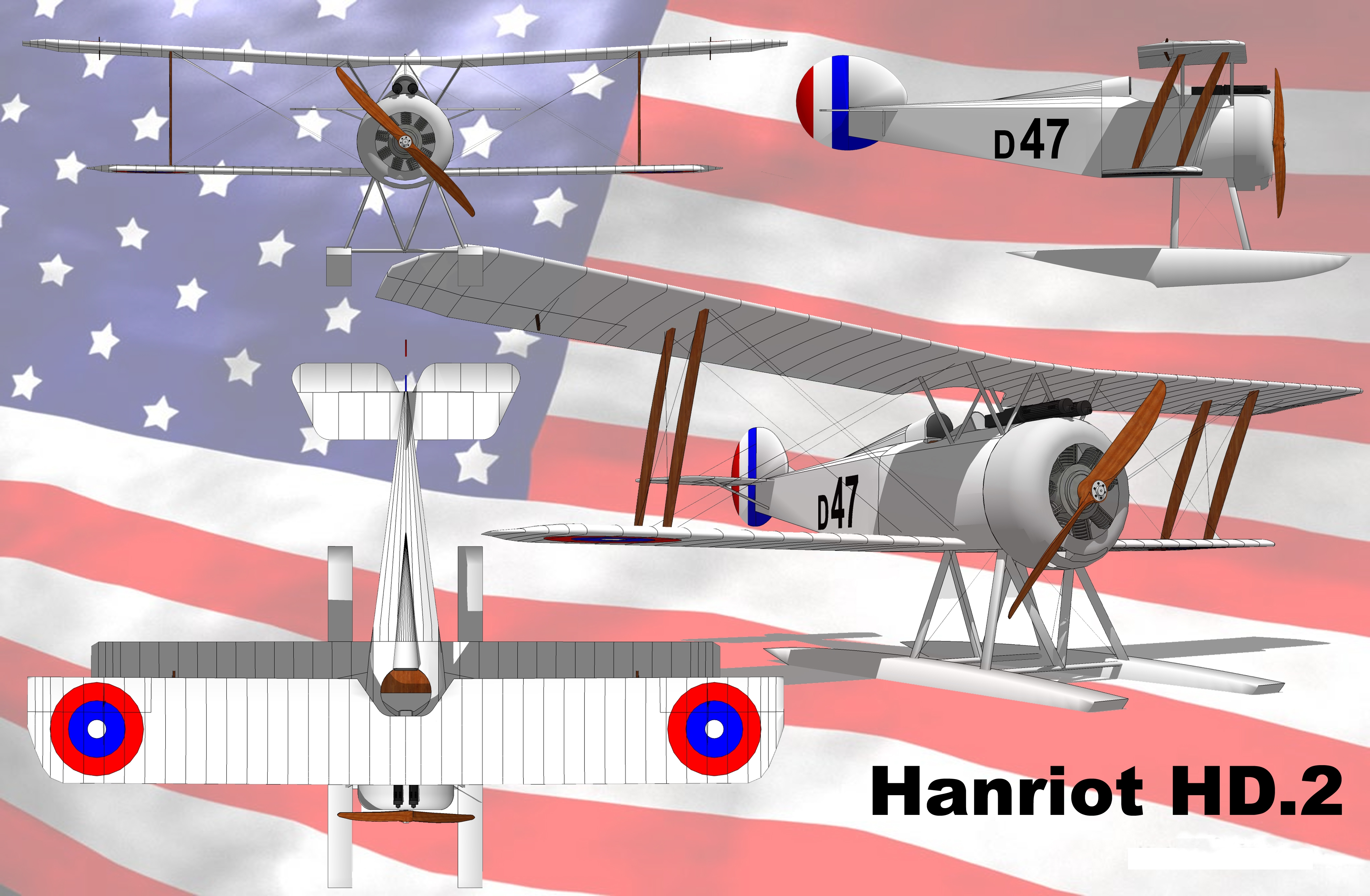 Plan 3 vues du Hanriot HD-2